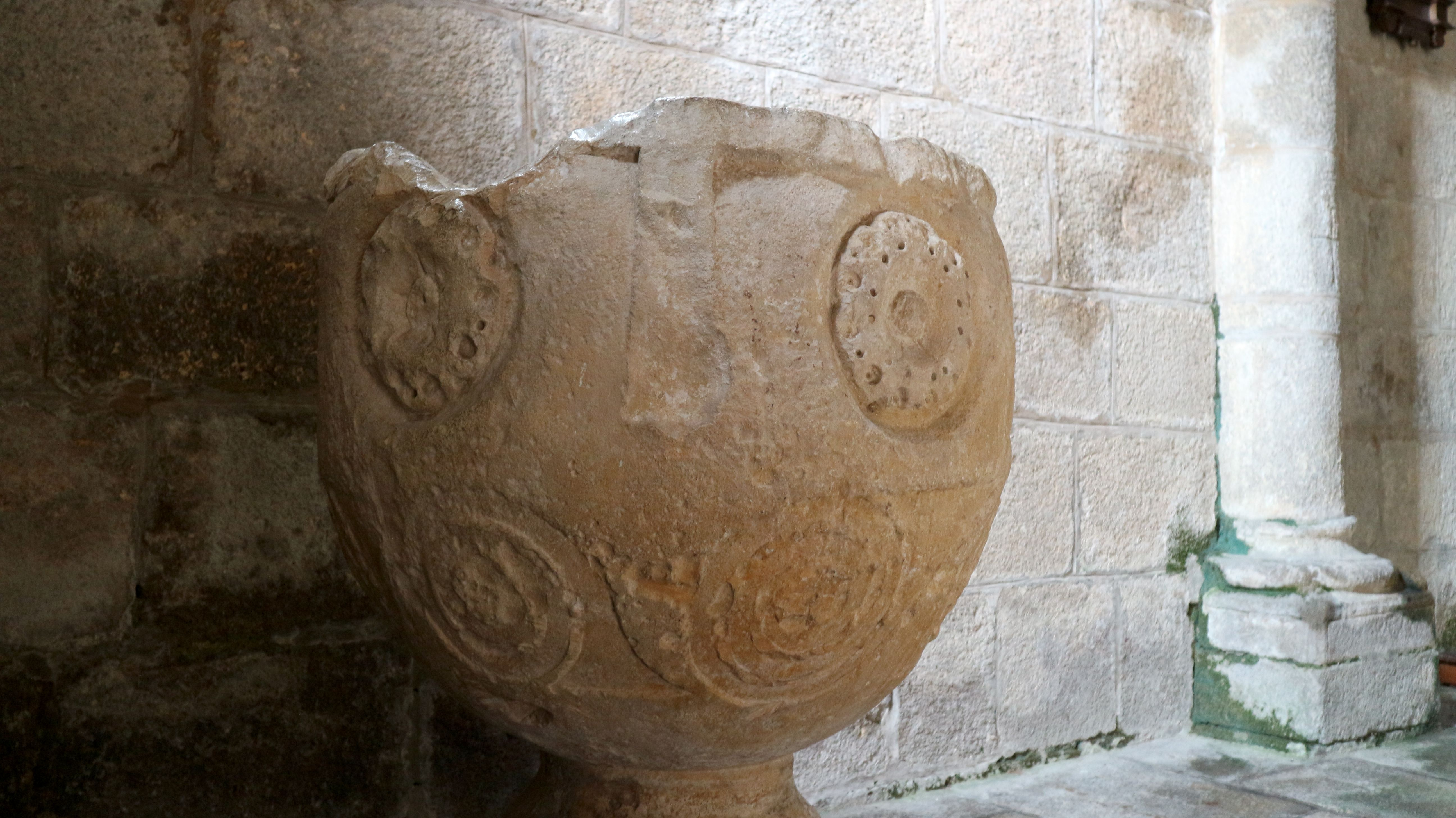 Igrexa de Santa María de Cambre, Cambre. Interior: nave central, retablo, altar, sagrario, santos, pía bautismal...